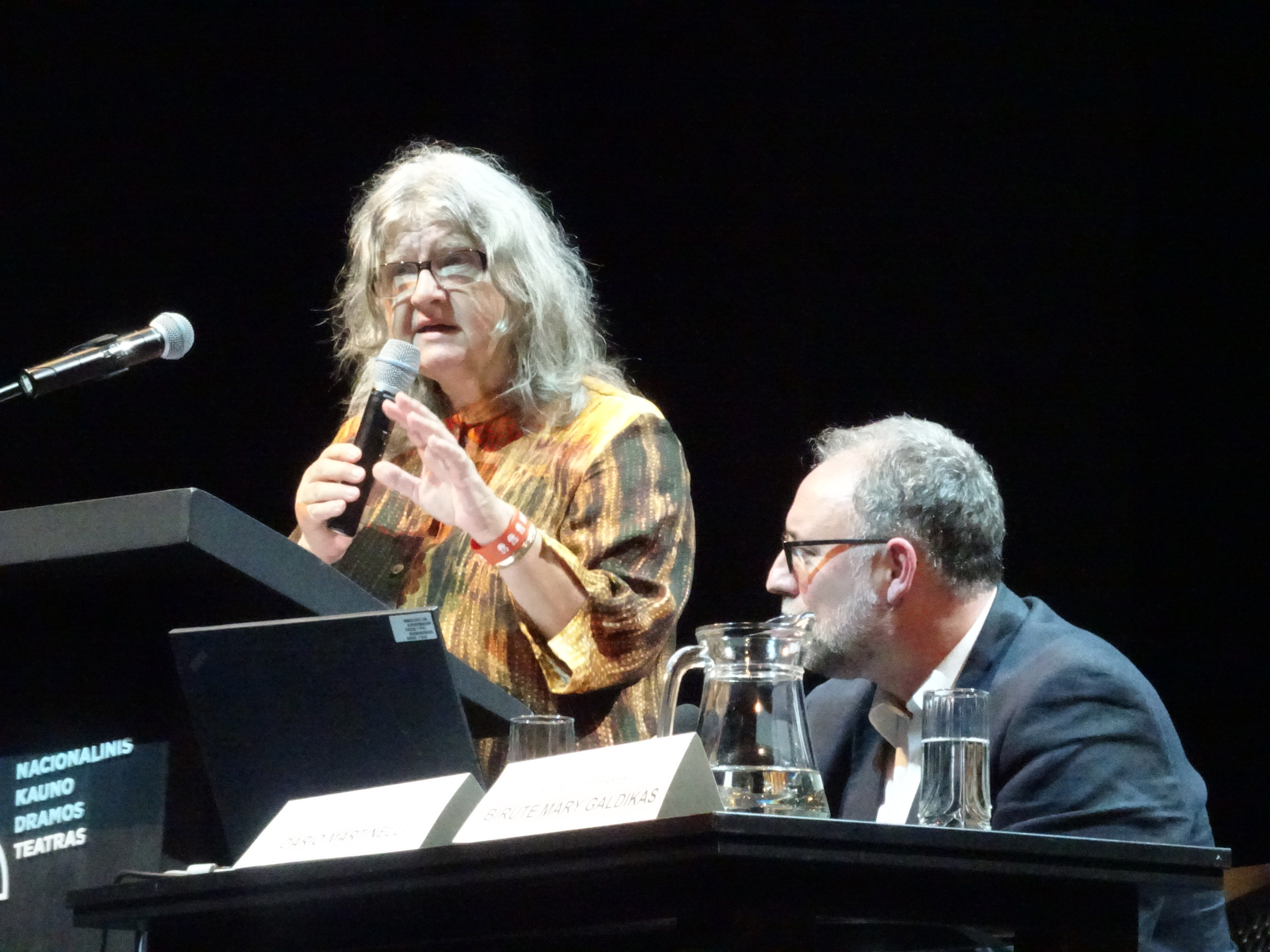 Birute Galdikas kõnelemas 13. maailma semiootikakongressil Kaunases. Kõrval Dario Martinelli.